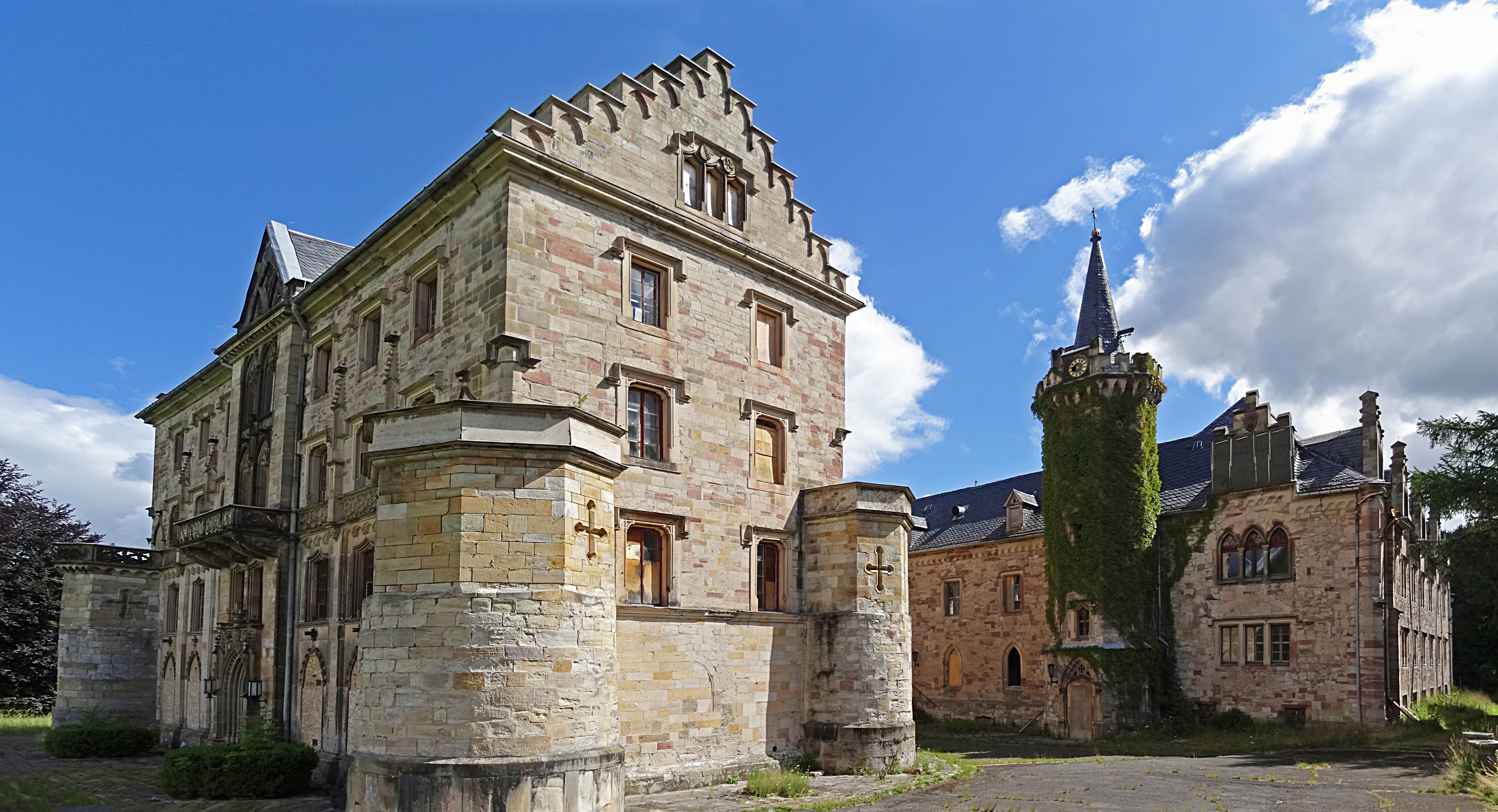 Schloss Reinhardsbrunn, Jagdschloss des Herzogtums Sachsen-Coburg und Gotha